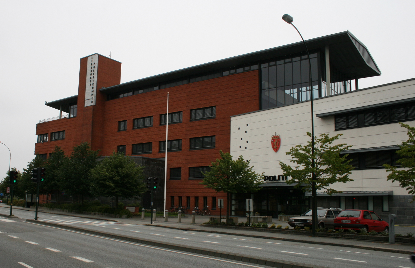 Stavanger politistasjon